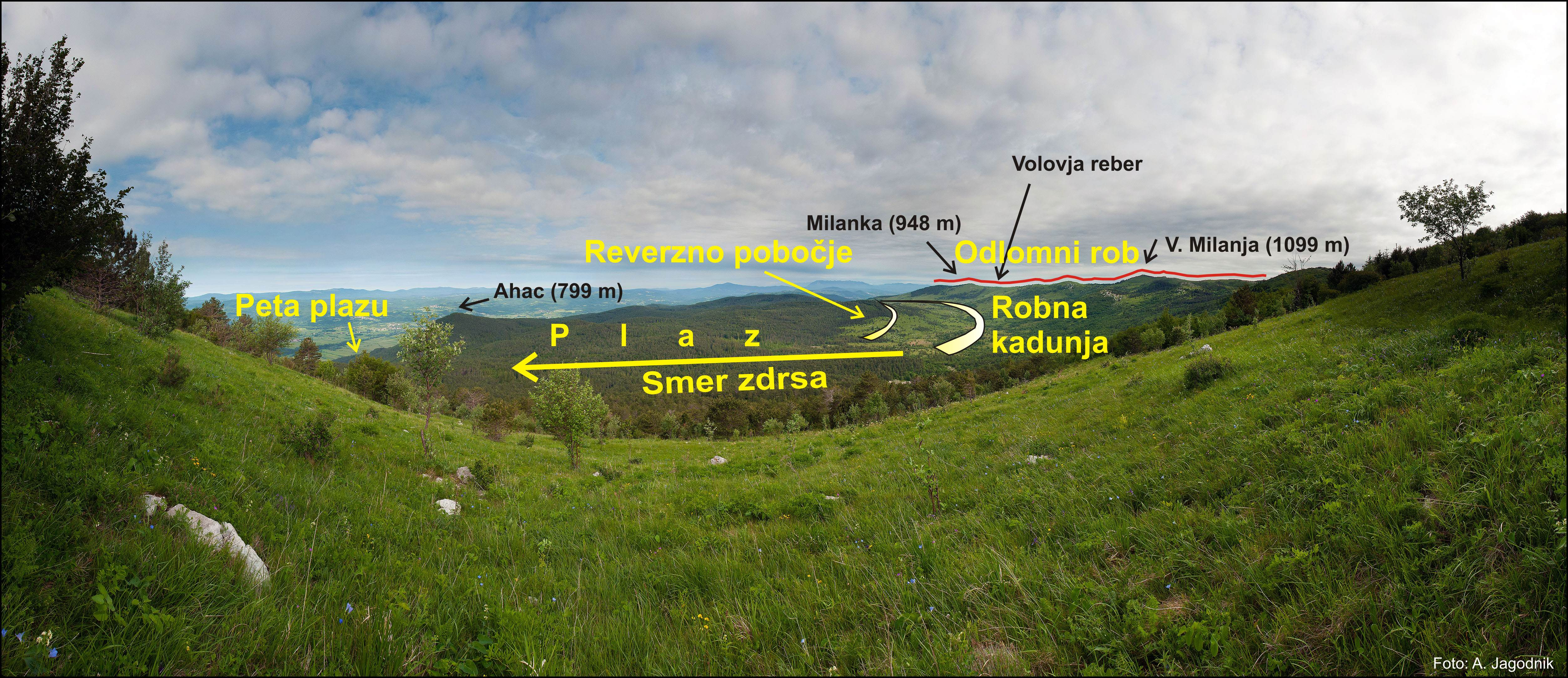 Ilirskobistriški fosilni plaz, pogled z južnega odlomnega roba z Gabrovca